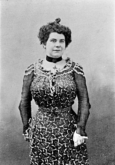 Eva Circé.